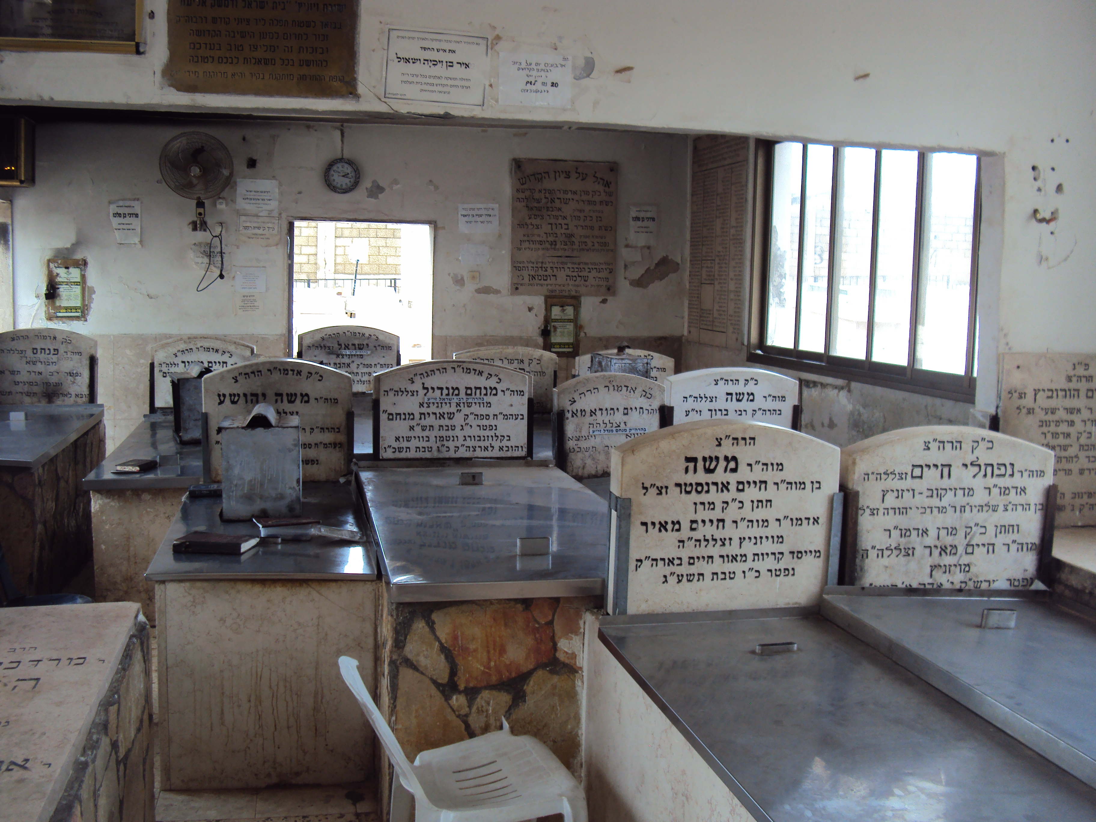 אוהל אדמו"רי ויז'ניץ בבית הקברות שומרי שבת, זכרון מאיר, בני ברק